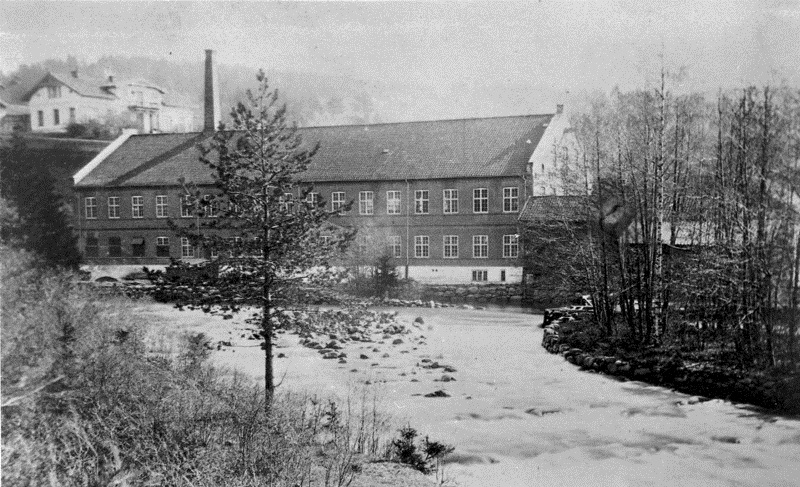 Ellendalens Spinderi, villa, Nydalens Compagnies bestyrerbolig. Ellendalens Spinderi, fra 1895 en del av Nydalens Compagnie.